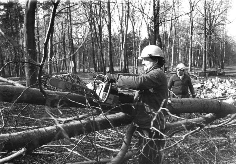 Dresden, Roden ADN-ZB Häßler 7.4.1982 Bez. Dresden-Wertvolles Buchenholz für Sägewerke und Zellstoffbetriebe schlagen gegenwärtig Bruno Stiasny und andere Arbeiter des Staatlichen Forstwirtschaftsbetriebes Dresden in der Dresdner Heide ein. Die etwa 100 Jahre alten Bäume werden durch Neuanpflanzung ersetzt. - siehe auch 1982-0407-4N